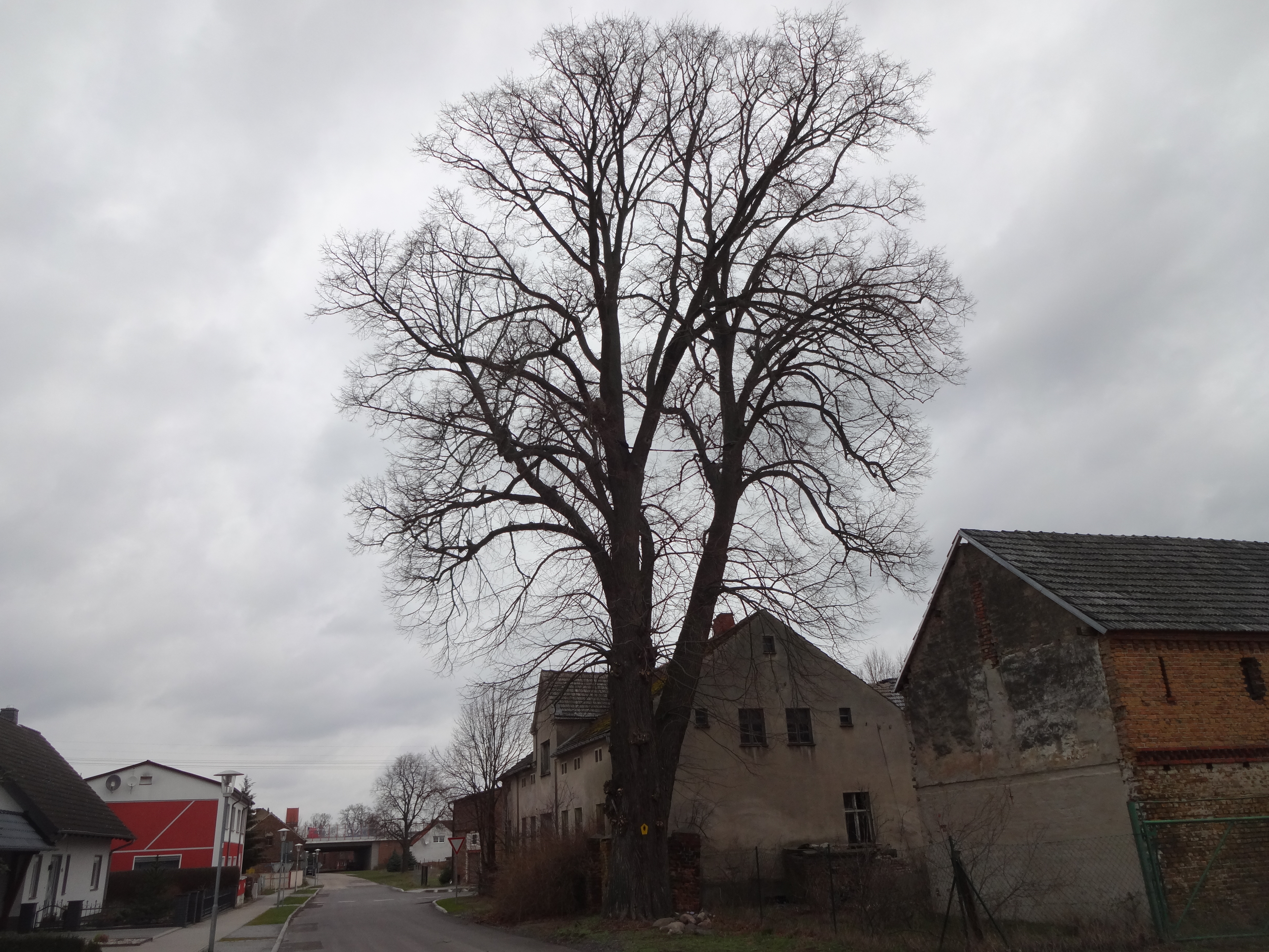 als Naturdenkmal geschützte Linde in Grebs an der Michelsdorfer Landstraße (Weg nach Oberjünne)